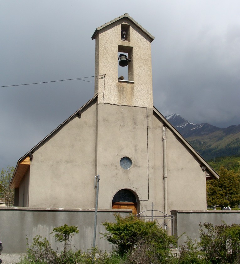 Le temple de la Plaine de Chabottes, entouré par le cimetière. Façade sobre, avec clocheton traditionnel mais sans croix.